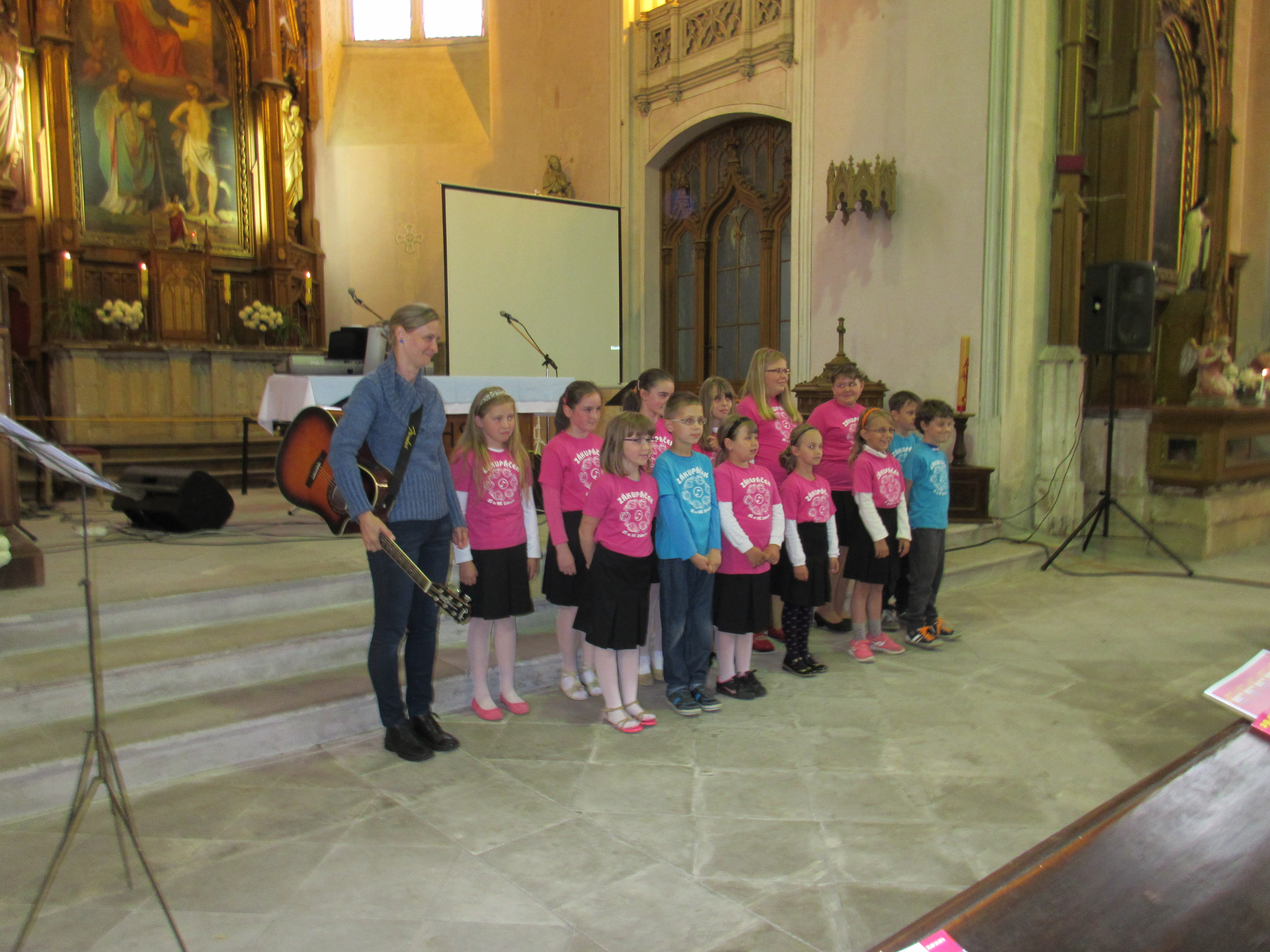 Dětský soubor Zákupáček při akci Noc kostelů 2015 v zákupském kostele